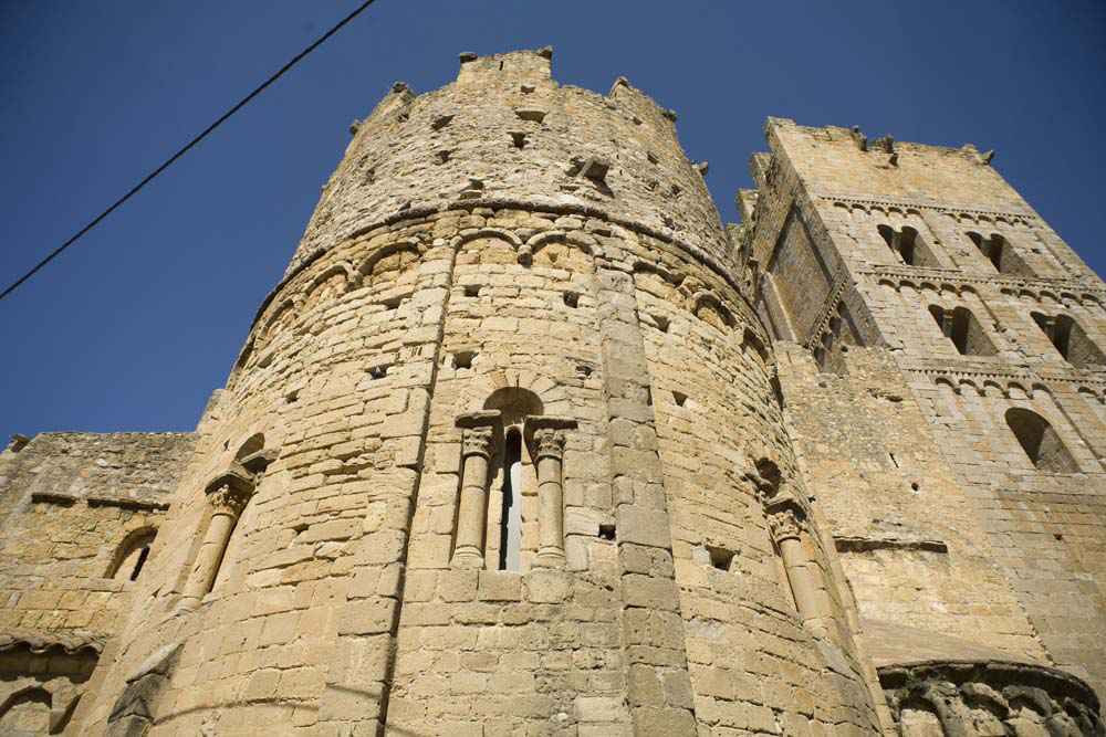 cultural heritage of Spain RI-51-0000563